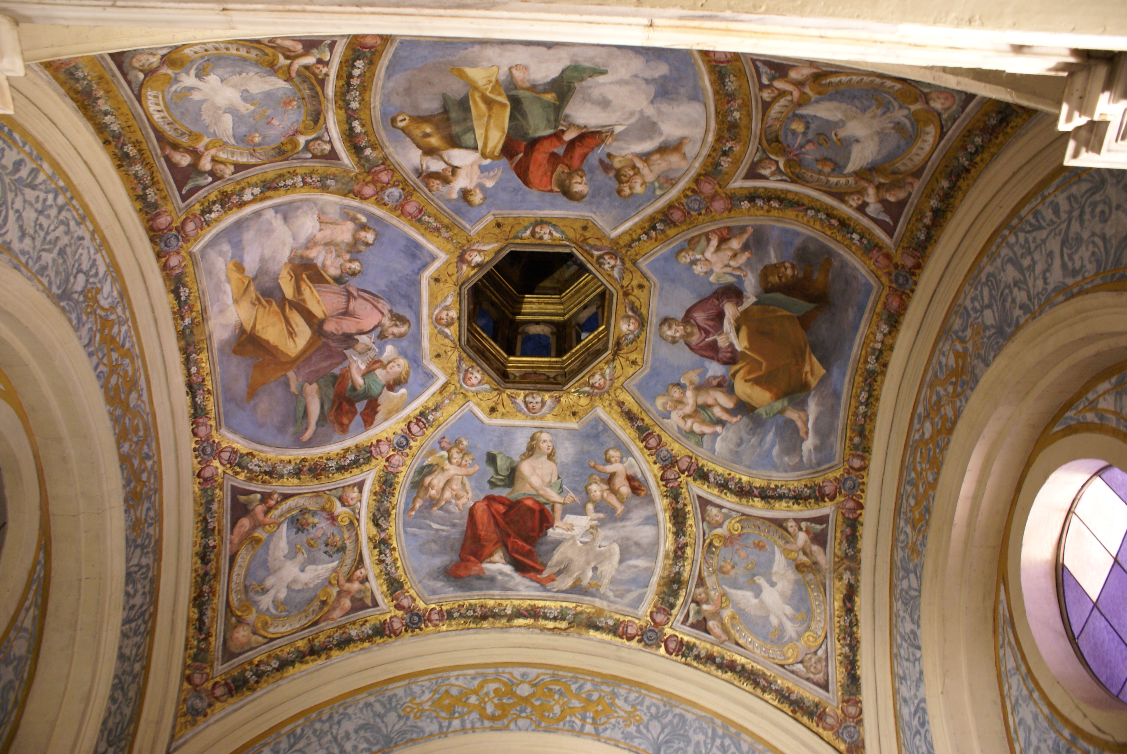 Castello Estense This is a photo of a monument which is part of cultural heritage of Italy.